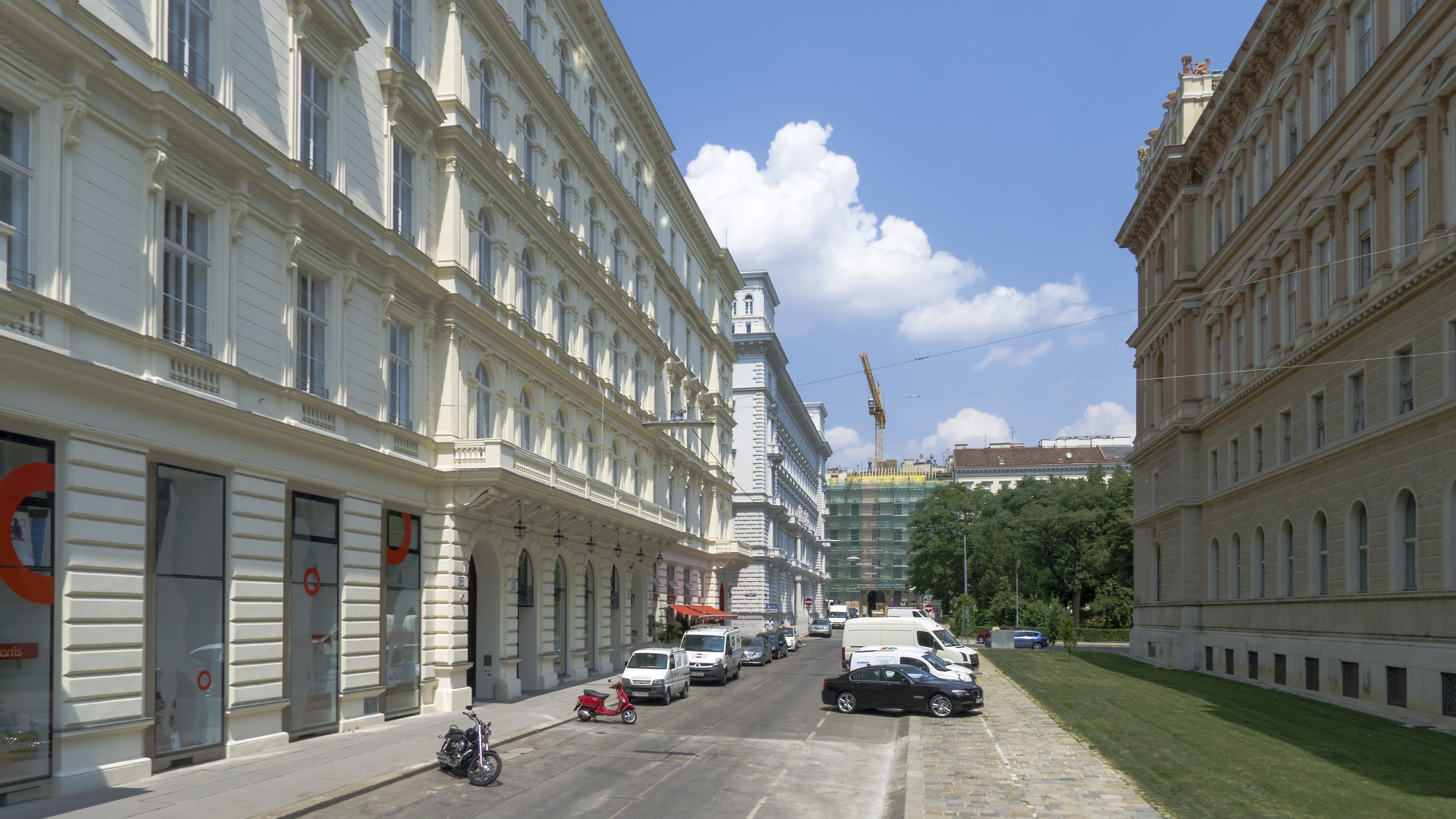 Gauermanngasse in Wien 1 beim Getreidemarkt Richtung Norden